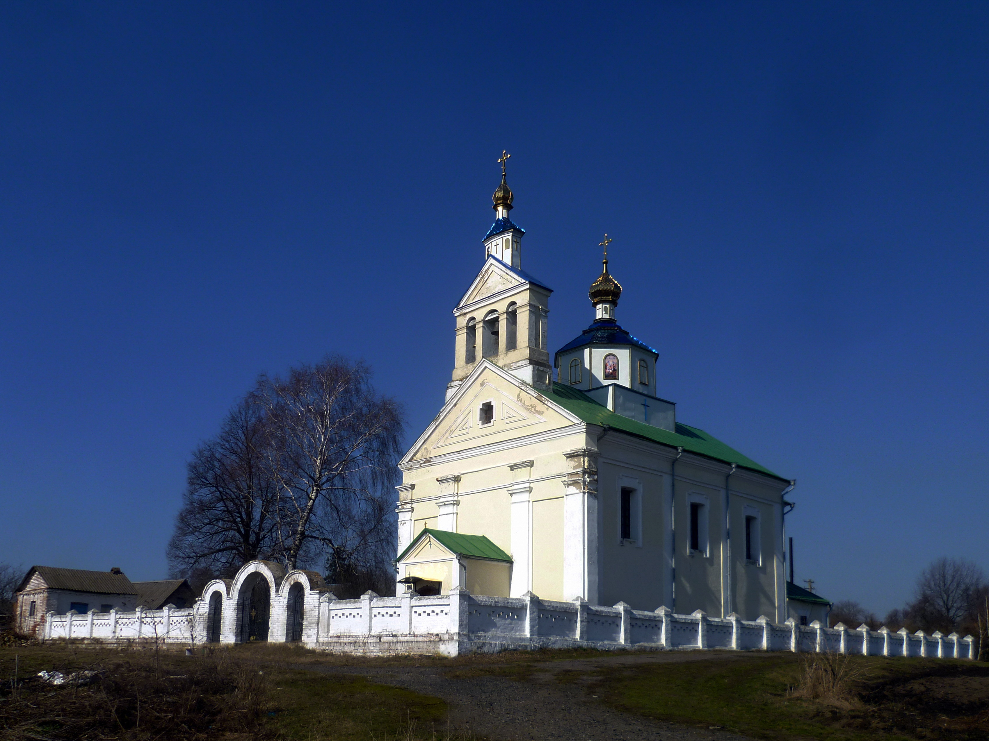 Церква Параскеви П'ятниці (мур.) (18 ст.) - вигляд з південного сходу - с.Соснина Іваничівський район Волинська область Україна